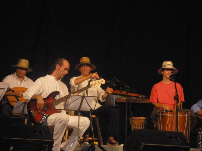 Aixama en directe. Agost 2008.